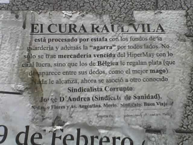 Panfletos repartidos en las elecciones de 2009 en la localidad de Merlo.